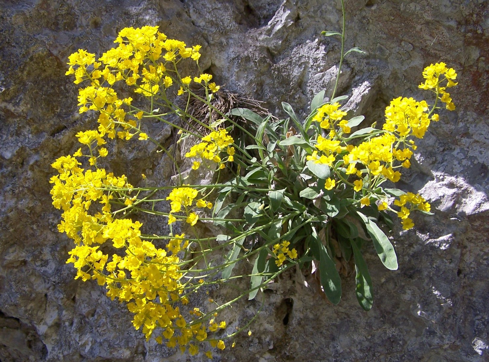 Alyssum saxatile (pl. smagliczka skalna)